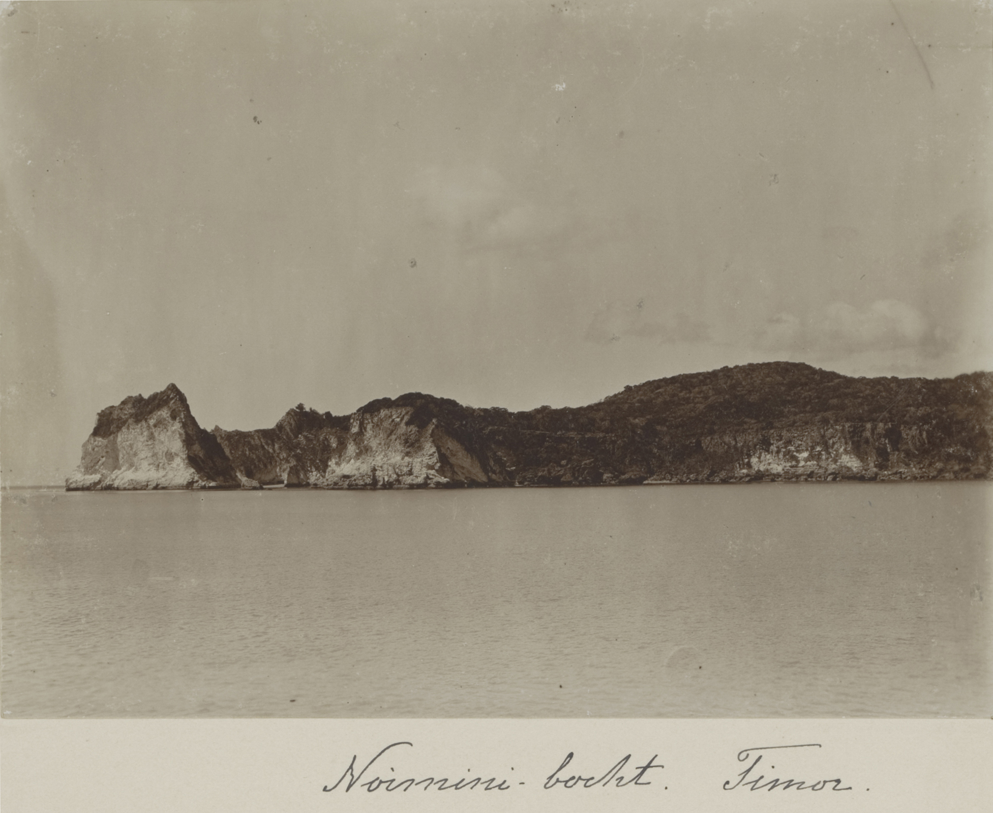 Academische Collecties: 1899-1900, Siboga-expeditie naar Nederlands Oost-Indië, onder leiding van Max Wilhelm Carl Weber De steile witte rots aan de zuidzijde van de bocht.